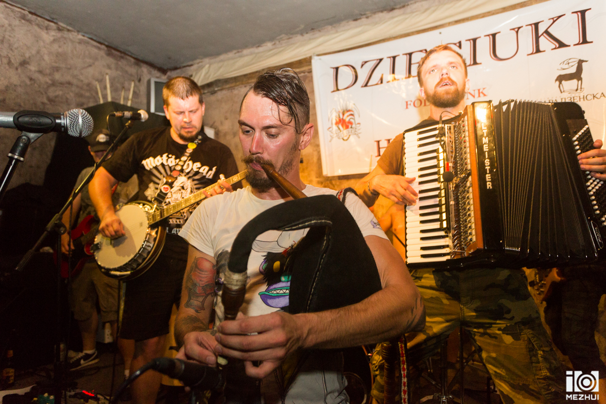 Выступление группы Dzieciuki в клубе Sklad Butelek в Варшаве